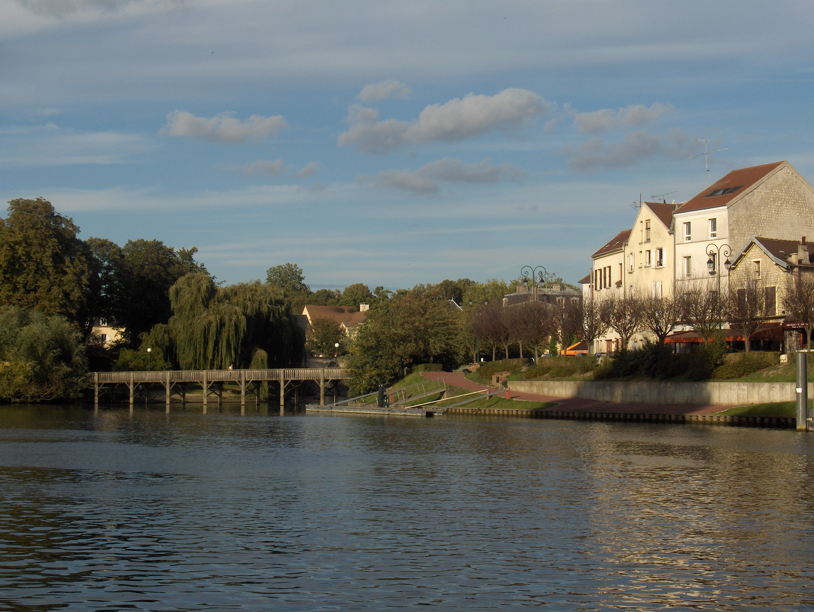 Vue depuis l'île du prieuré des rives aménagées de l'Oise à L'Isle-Adam et de la passerelle en bois les reliant à l'île de la Cohue (Val-d'Oise)